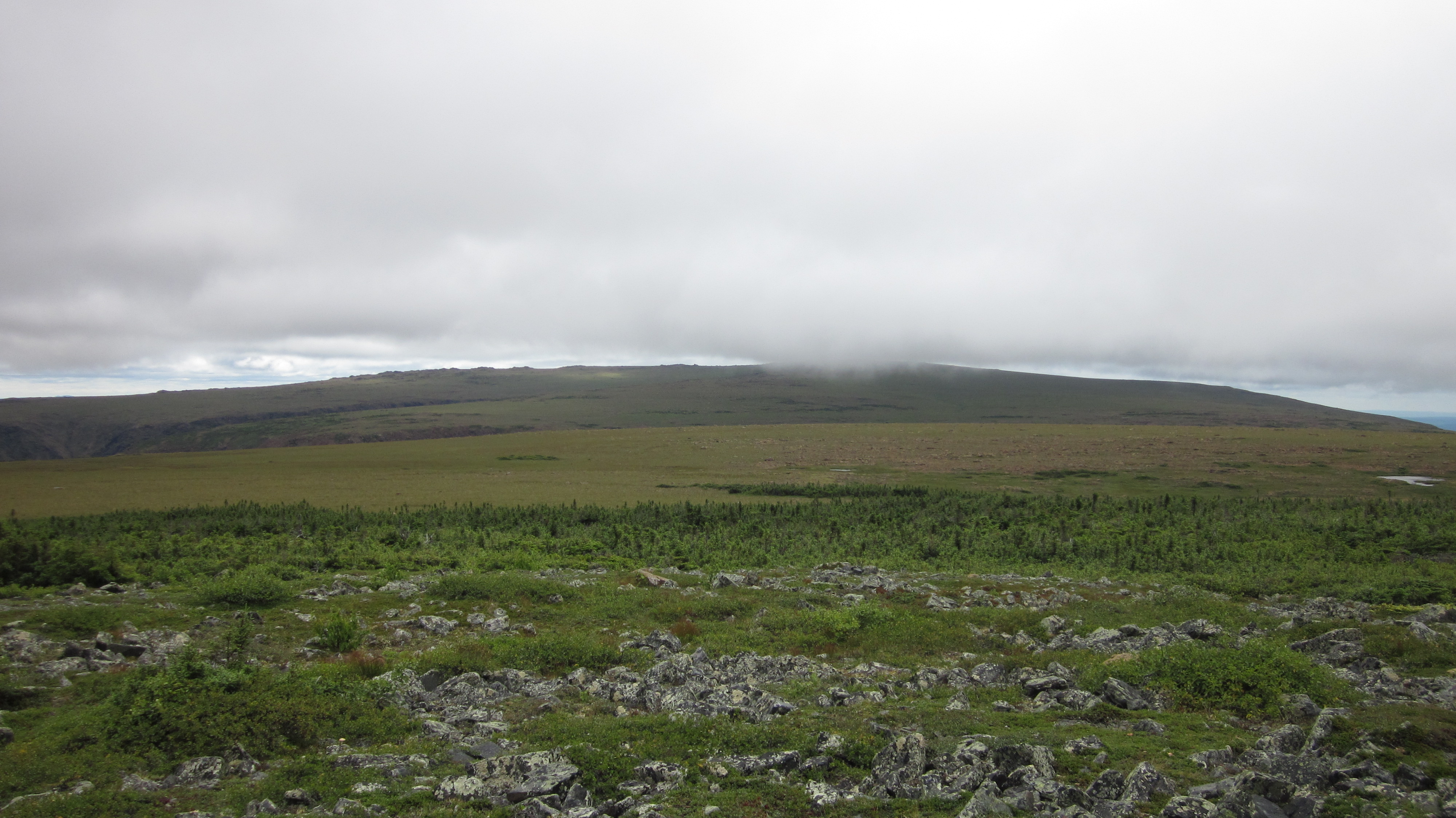 Sommet Albert Sud et table à Moïse, pris près de l'abri Le Rabougri